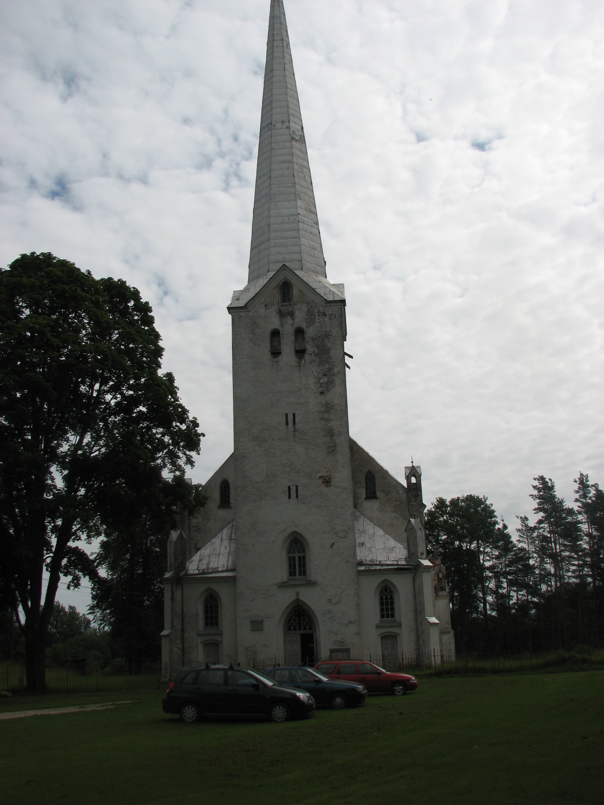 Tarvastu kirik